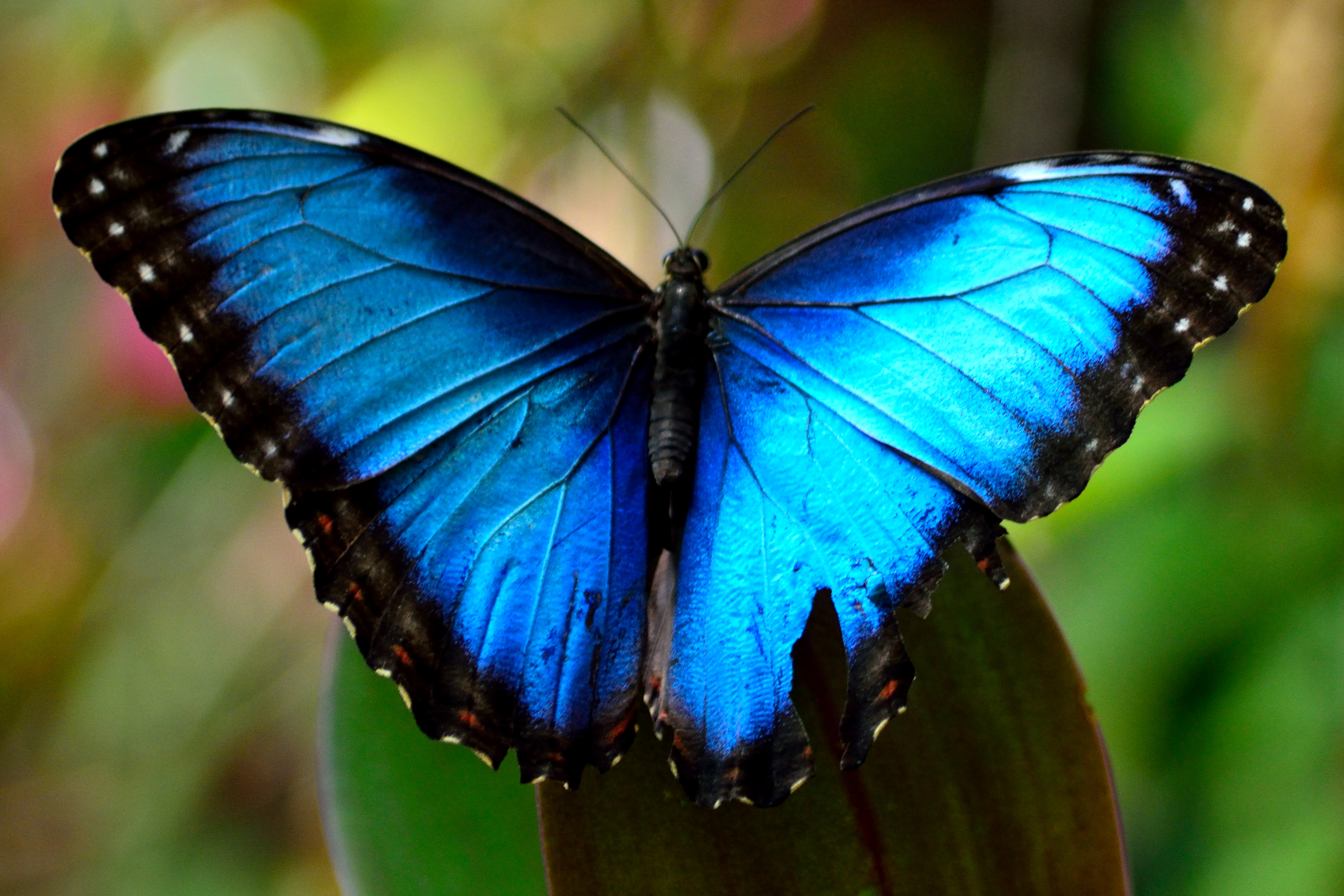 Morpho peleides